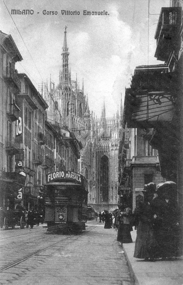 Milano tram Corso Vittorio Emanuele